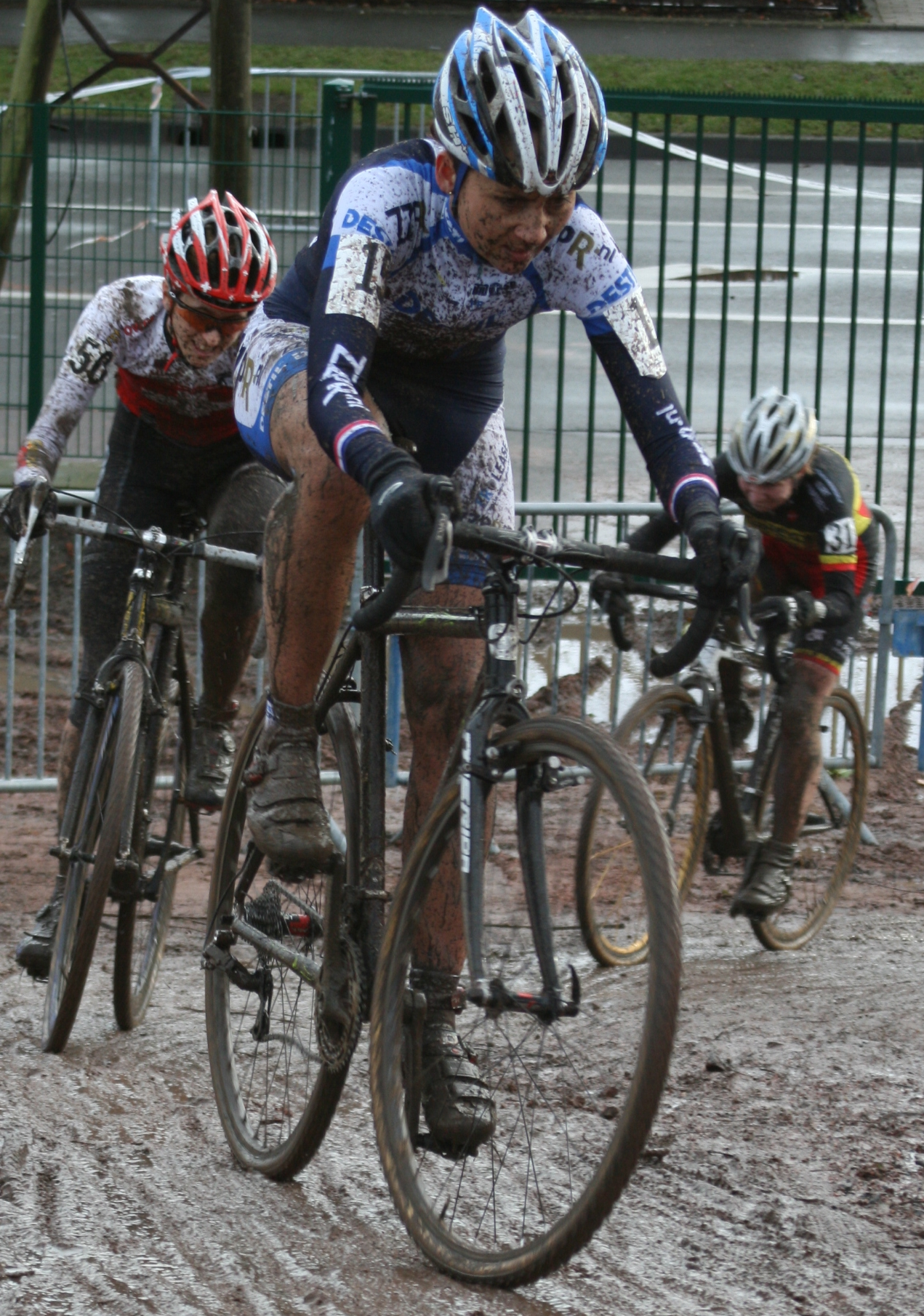 Reza Hormes-Ravenstijn lors du Grand Prix Lille Métropole 2009